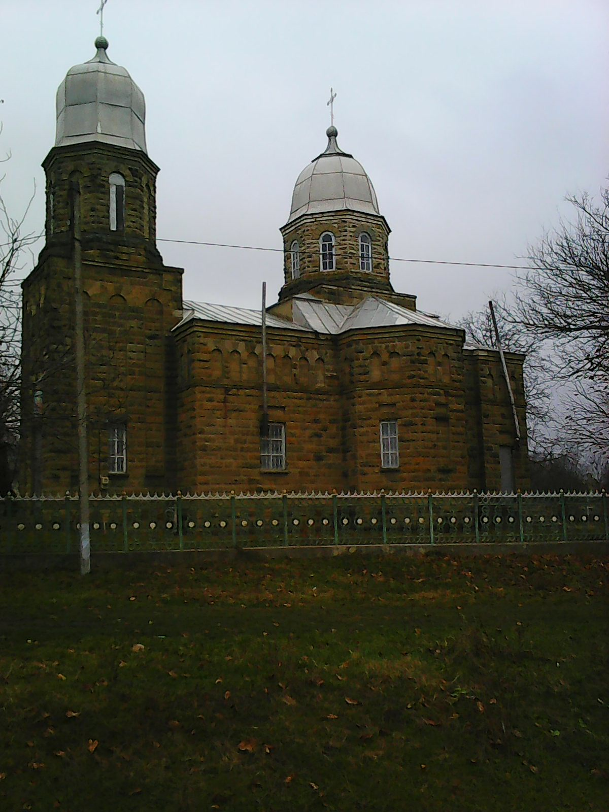 Biserica nouă